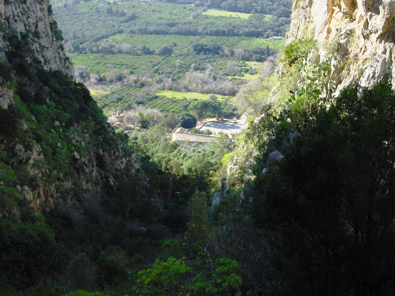 Riserva naturale Monte Pellegrino Palermo, Sicily Valle del Porco